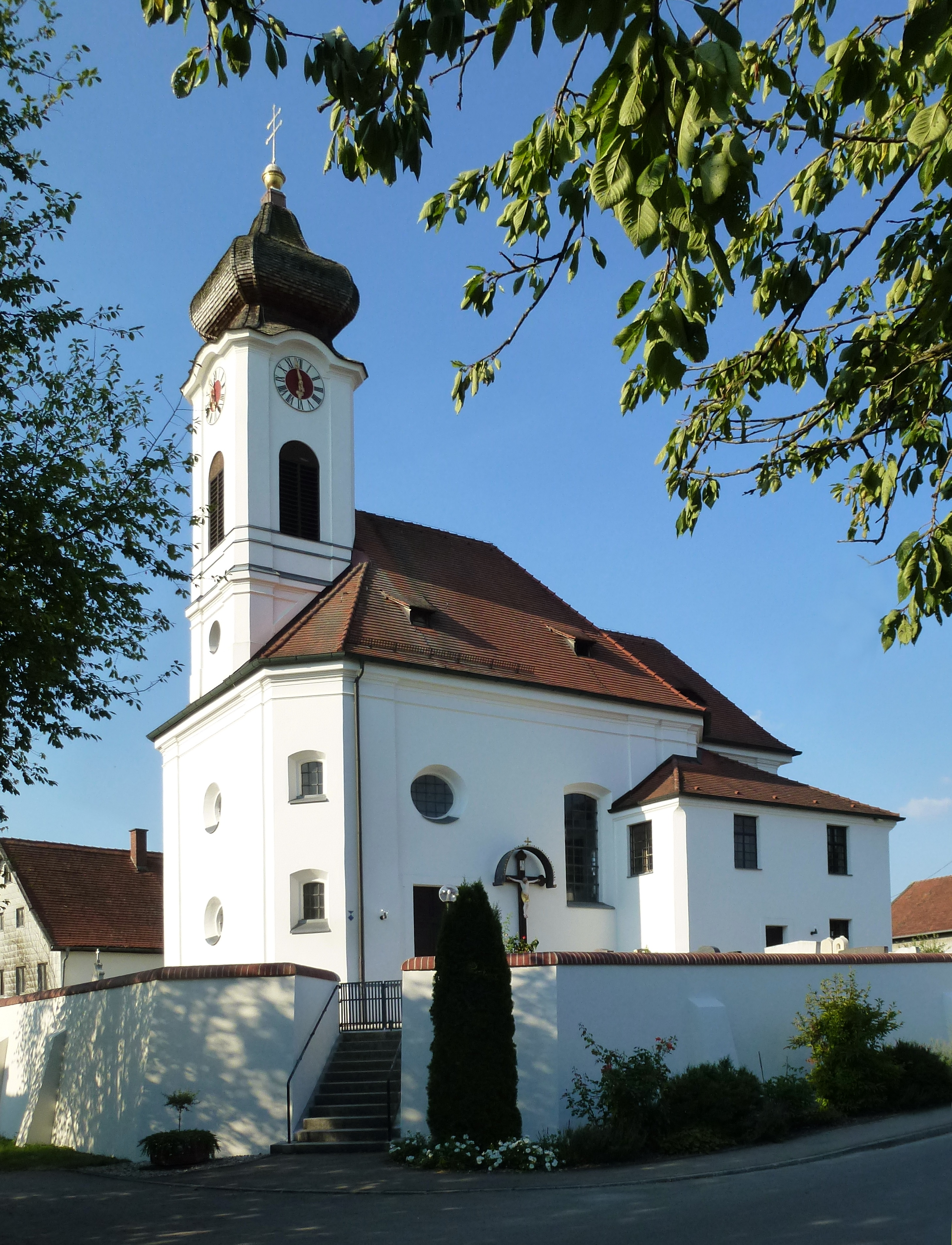 Sigmertshausen, Kirchenstr.15: Katholische Filialkirche St. Maria und Vitalis. Ansicht von der Straße aus SW